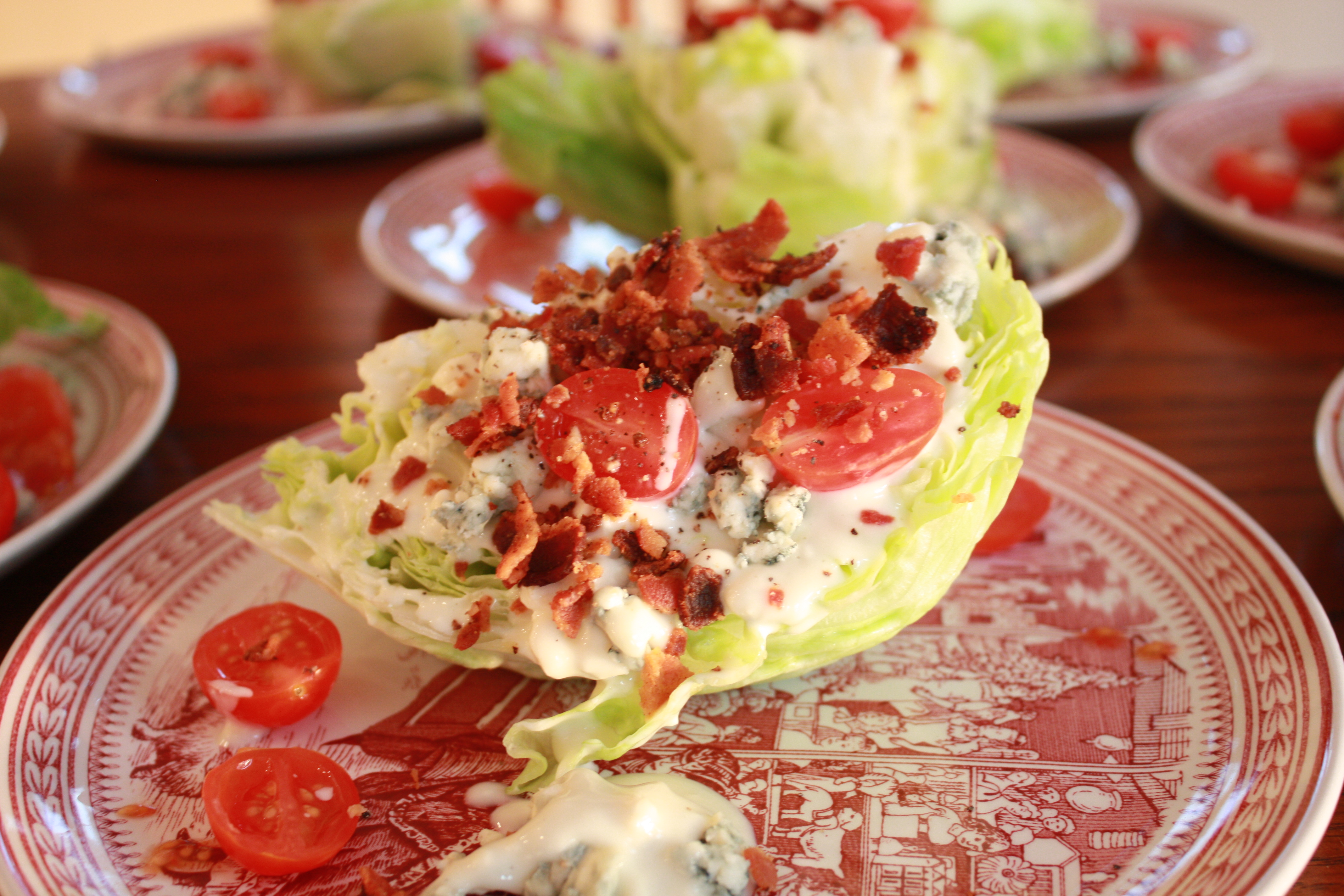 Wedge salad